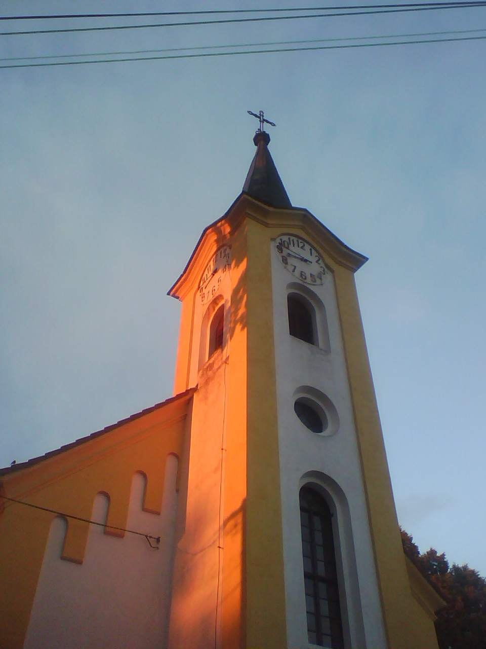 La chiesa di Stříbřec